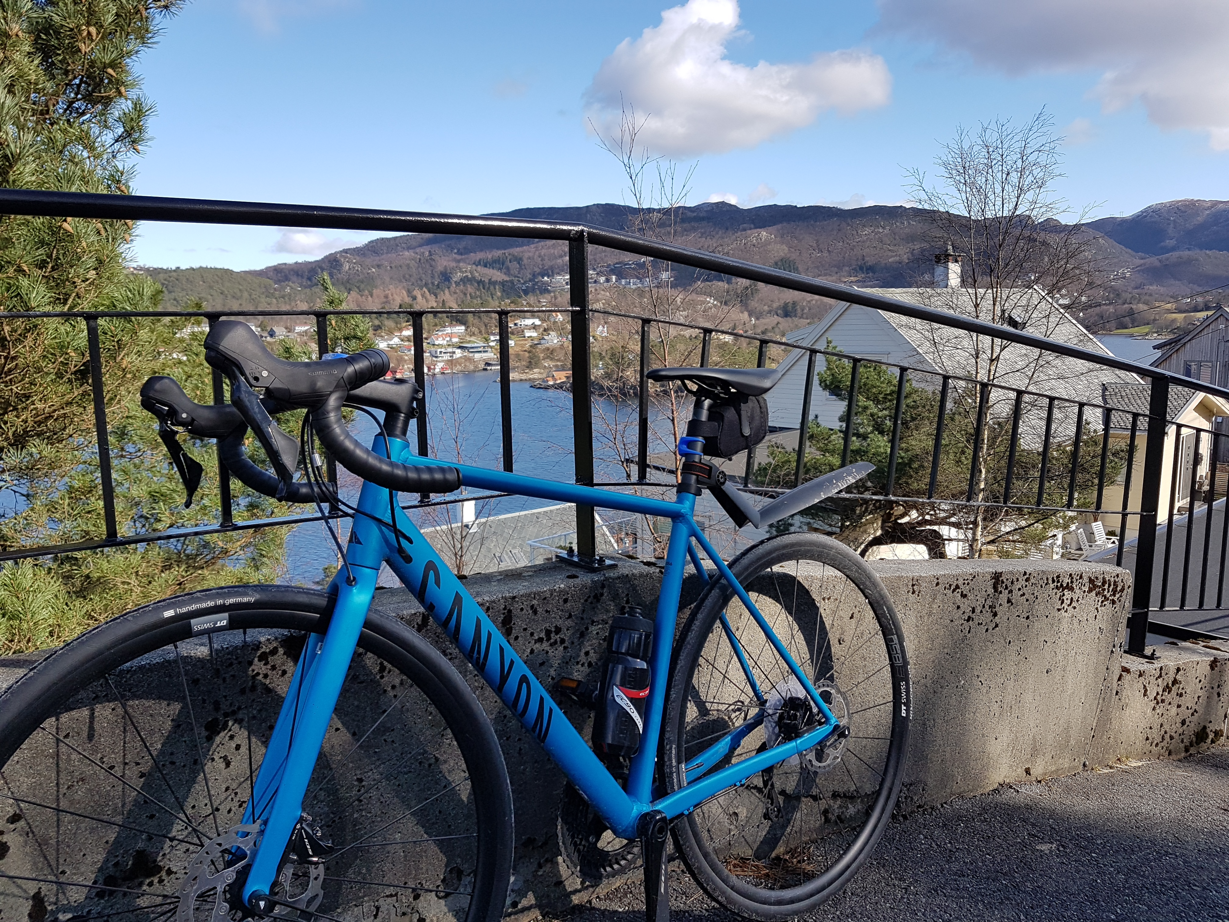 Фатаграфія веласіпеда Canyon Endurace AL Disc 7.0 (мадэль 2020 года) на прыродзе